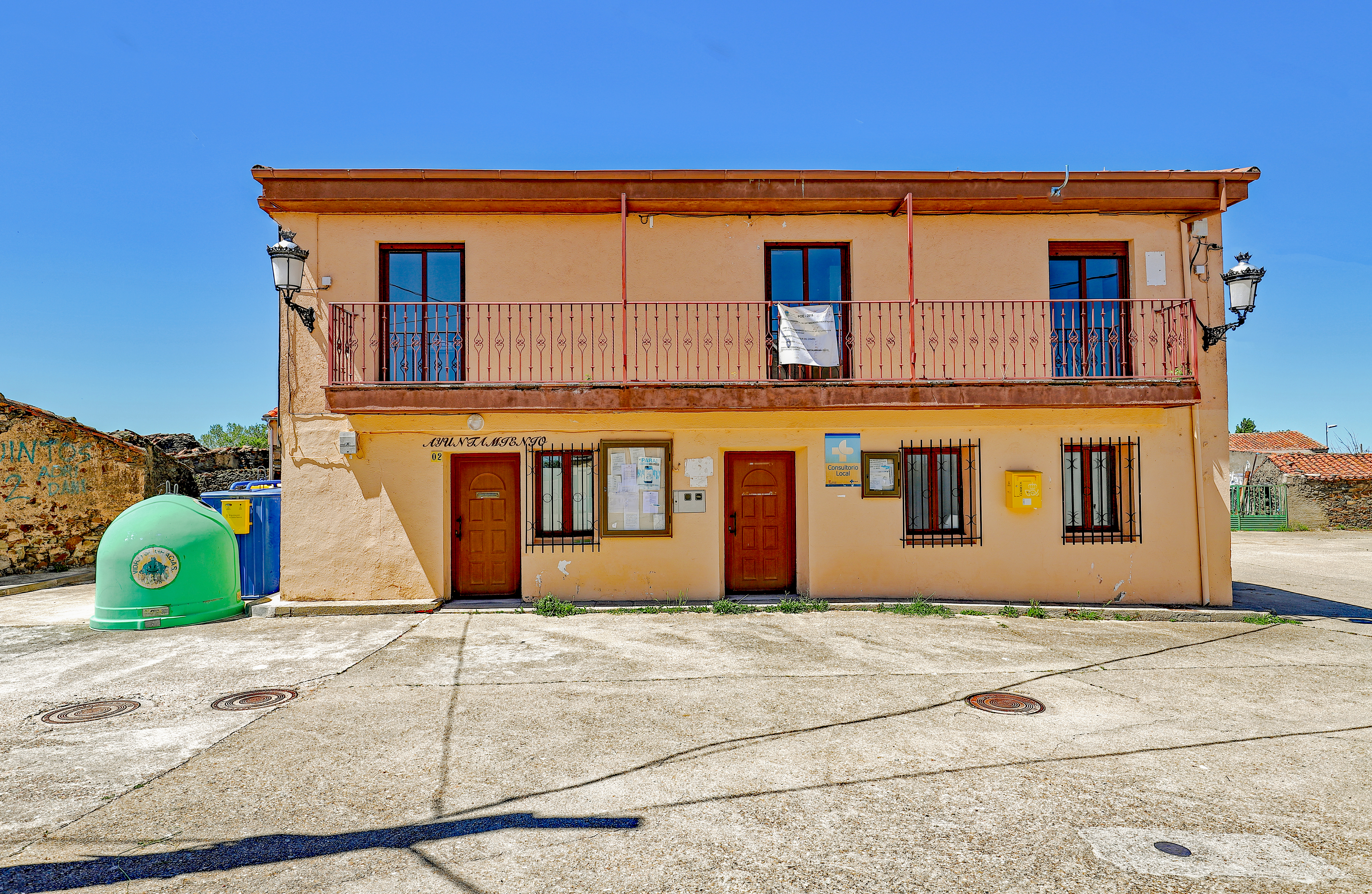 Herguijuela del Campo es un municipio de la comarca Entresierras, en la provincia de Salamanca.